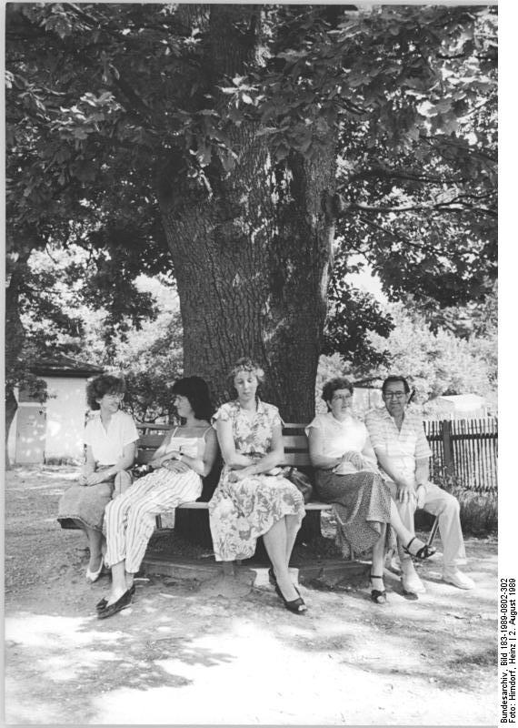 Friedrichroda, Haltepunkt der Thüringerwaldbahn Zum Beitrag: Obwohl sie bei der Jungfernfahrt entgleiste...-Sechzig Jahre Thüringerwaldbahn von Gotha nach Tabarz ADN-ZB Hirndorf-2.8.1989 So läßt es sich auf die Bahn warten! In Friedrichroda, am Haltepunkt der Thüringerwaldbahn, die zwischen Gotha und Tabarz verkehrt, steht diese stattliche Eiche. (Hierzu gehören die Fotos 1989-0802-300N-302N!)